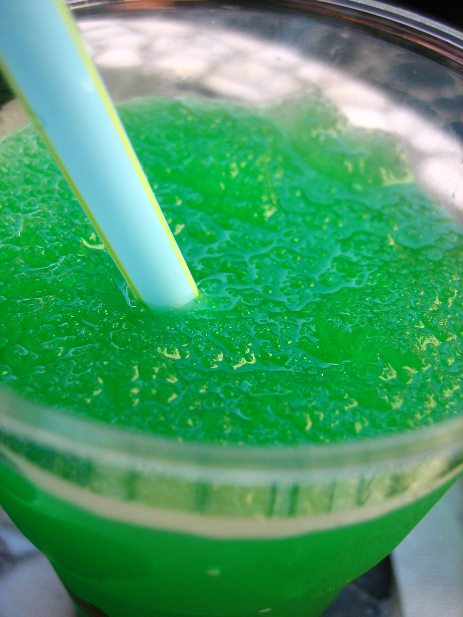 Granita di menta